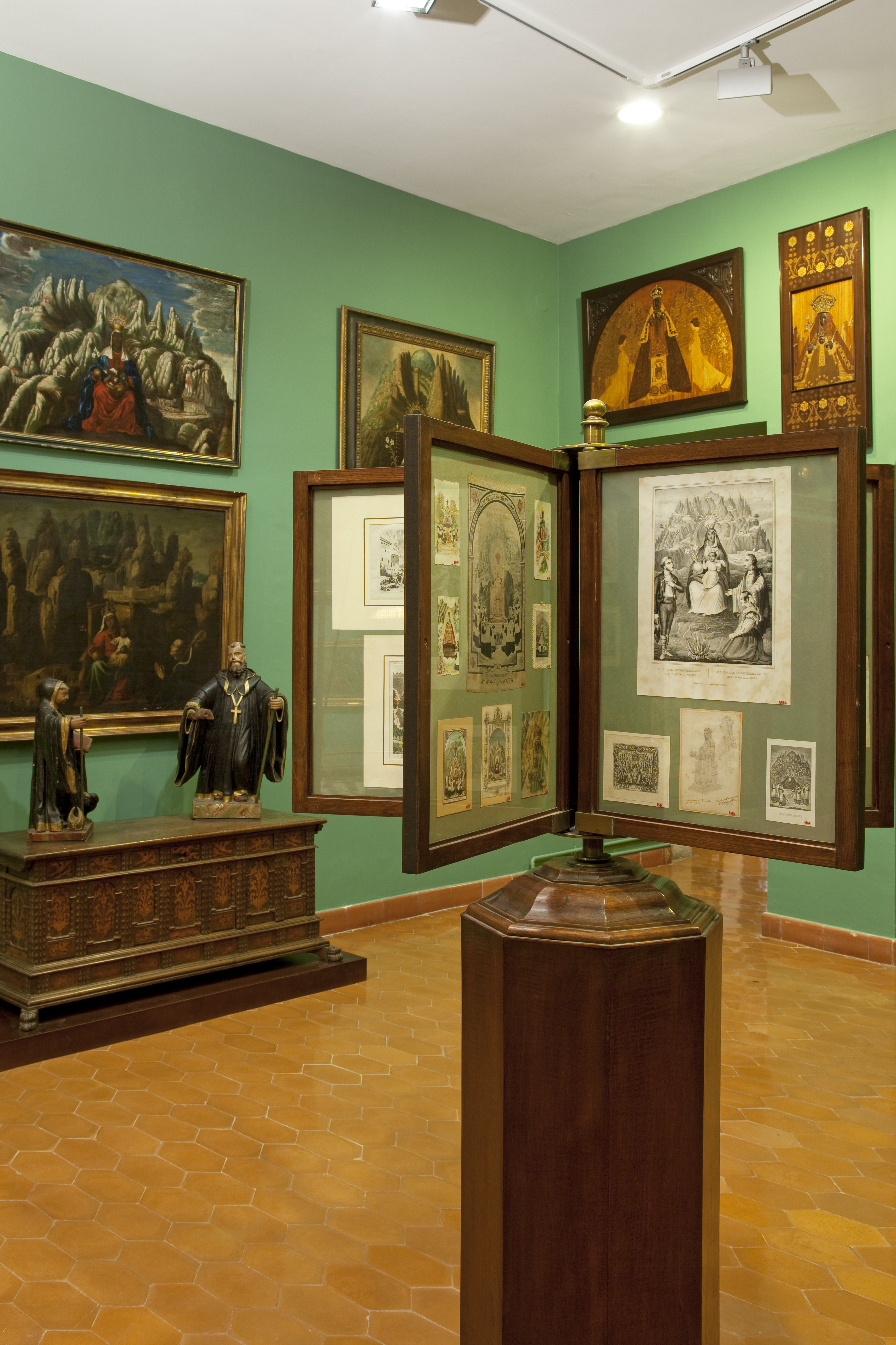 3 Gabinet col·leccionista - Fot. GUILLEM F-H.jpg